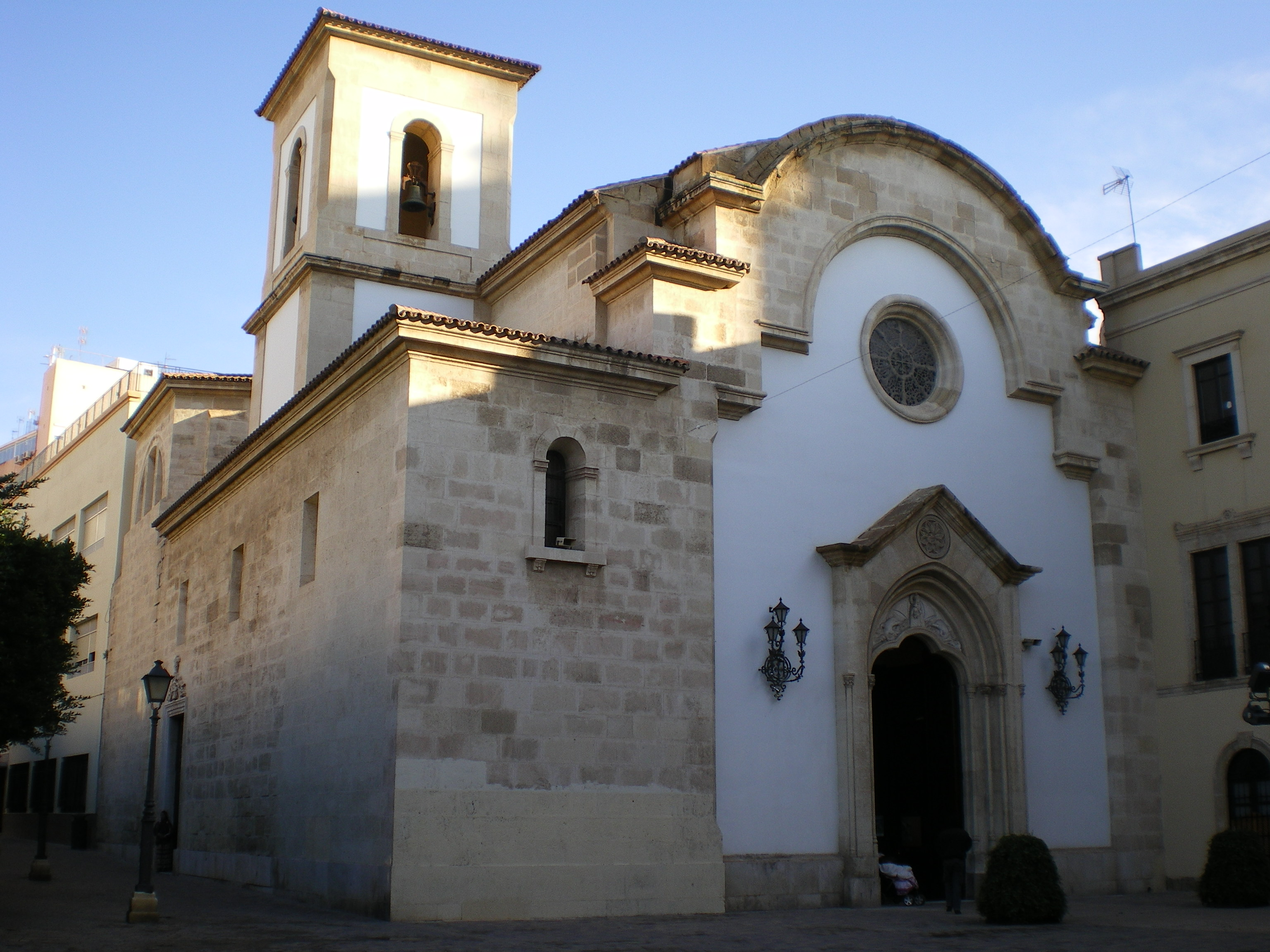 Fotografía de la fachada sur del Santuario de la Virgen del Mar, Patrona de Almería, Andalucía, España.